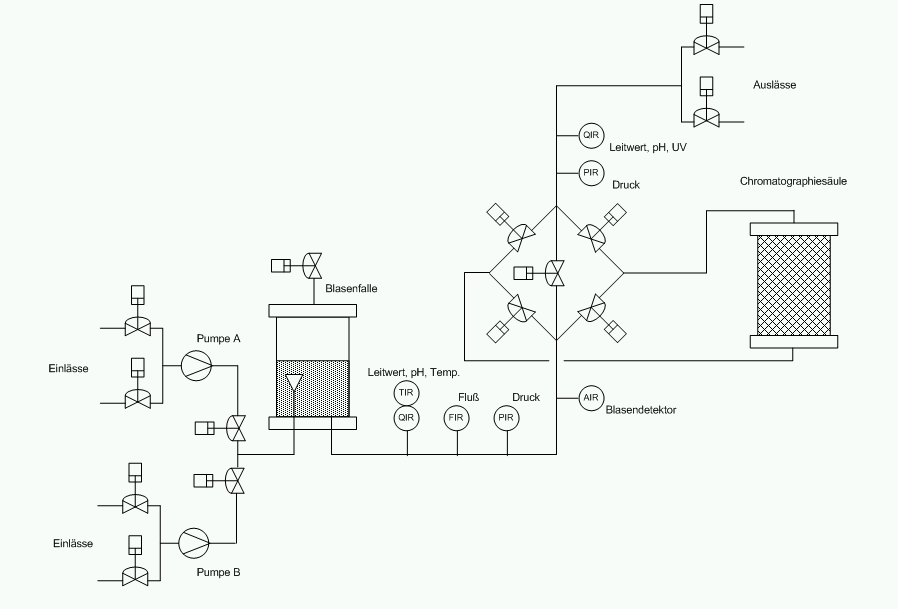 Schematische Darstellung eines Niederdruck-Flüssigkeitschromatographie-Systems